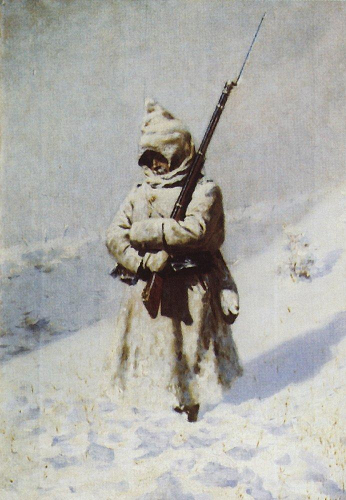 Солдат на снегу